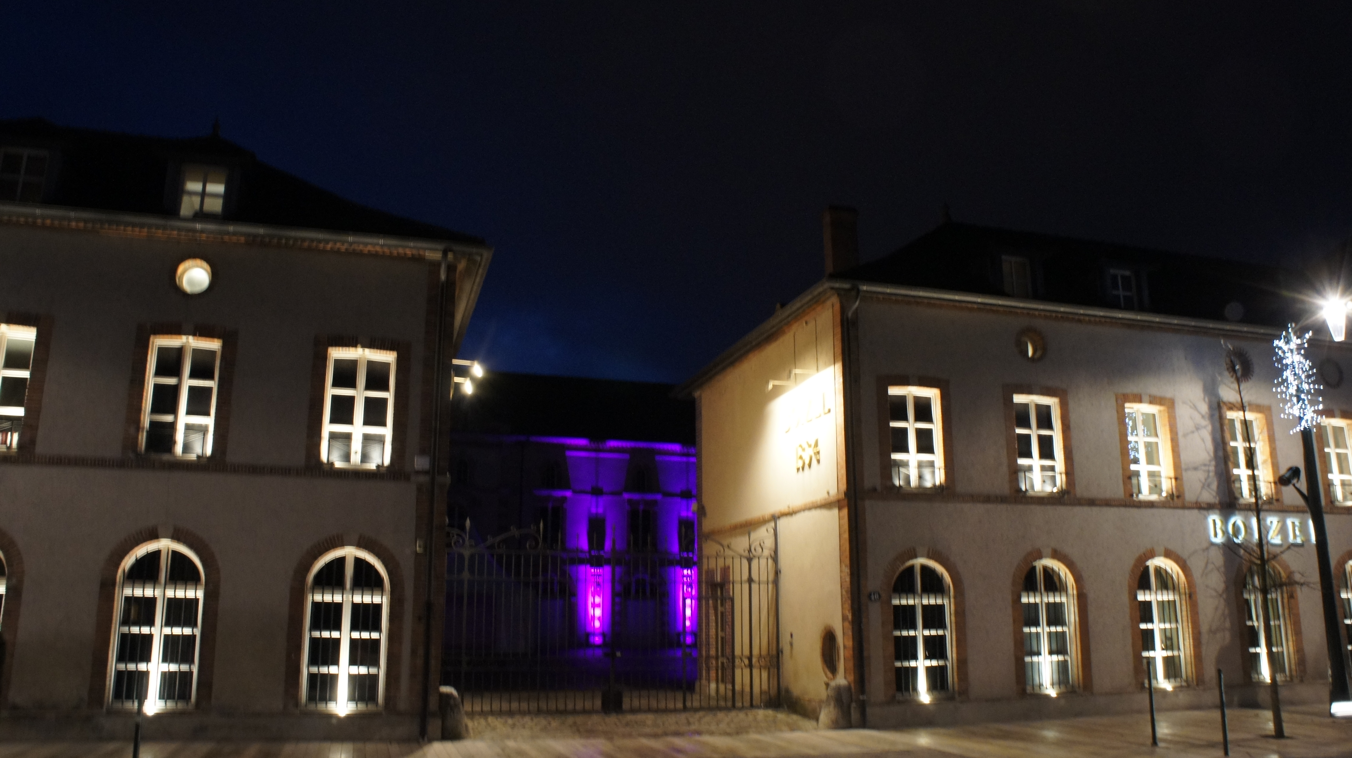 Maison de champagne Boizel .